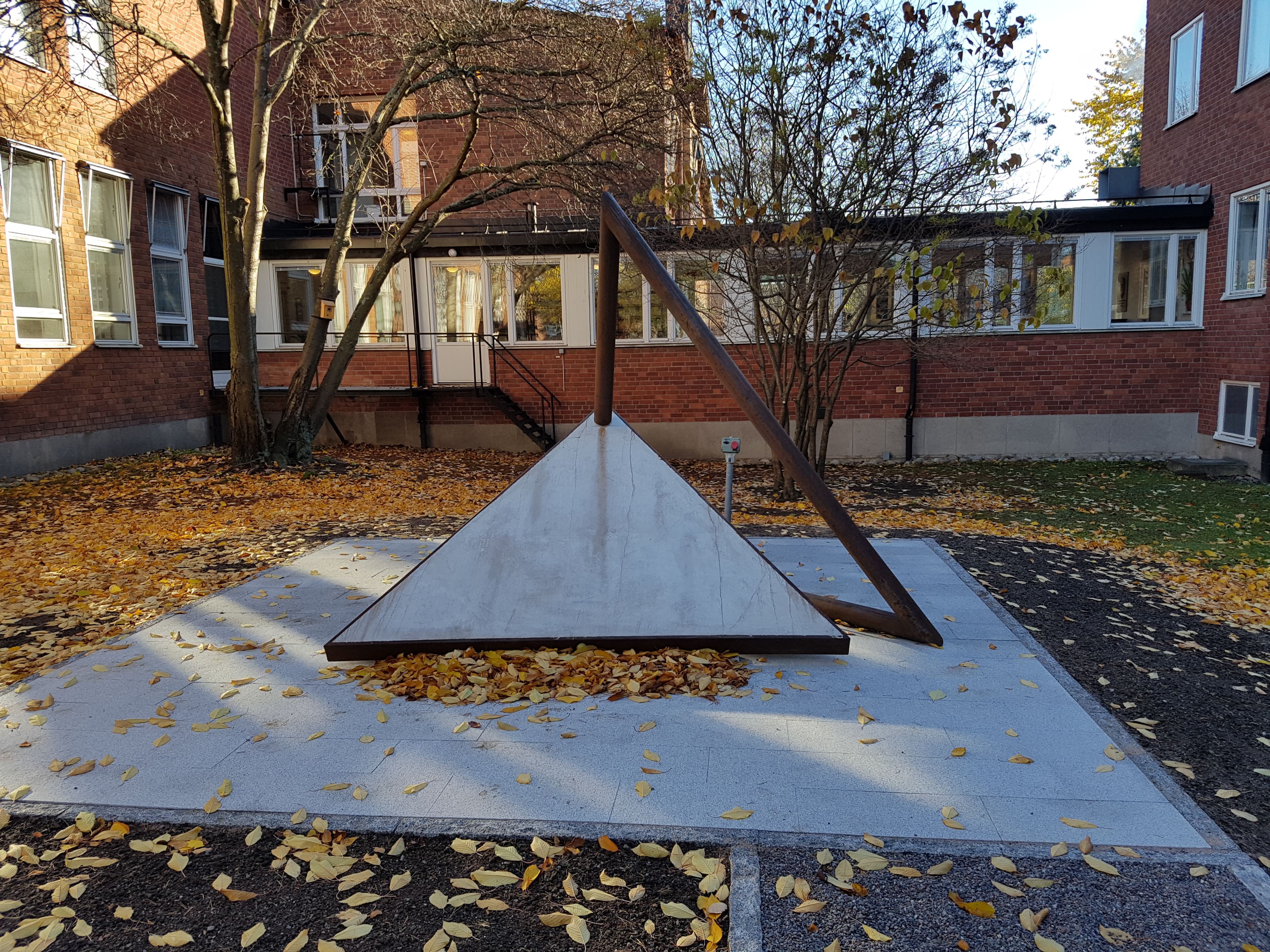 Trigon (1997) by Fredrik Sundahl, Solna. It is not clear whether freedom of panorama applies to this image. This is a depiction of a building or work of art in Sweden. The depicted work is believed to be protected by copyright. According to Article 24 of the Swedish copyright act, "Works of art may be depicted if they are permanently placed on or at a public place outdoors. Buildings may be freely depicted." It has been widely accepted that this provision made distribution of depictions such as this one legal. On 4 April 2016, however, the Supreme Court of Sweden issued a statement that Article 24 does not extend to publication in online repositories, and on 6 July 2017, a lower court ruled that linking to depictions of copyrighted artworks hosted on Commons constitutes copyright infringement. See Commons:Freedom of panorama#Sweden for more information. The implications of these decisions on Commons' ability to continue to distribute this and other depictions like it are currently under analysis. Reusing or linking to this file may have legal consequences. You are solely responsible for ensuring that you do not infringe the copyright belonging to someone else. See our general disclaimer for more information.